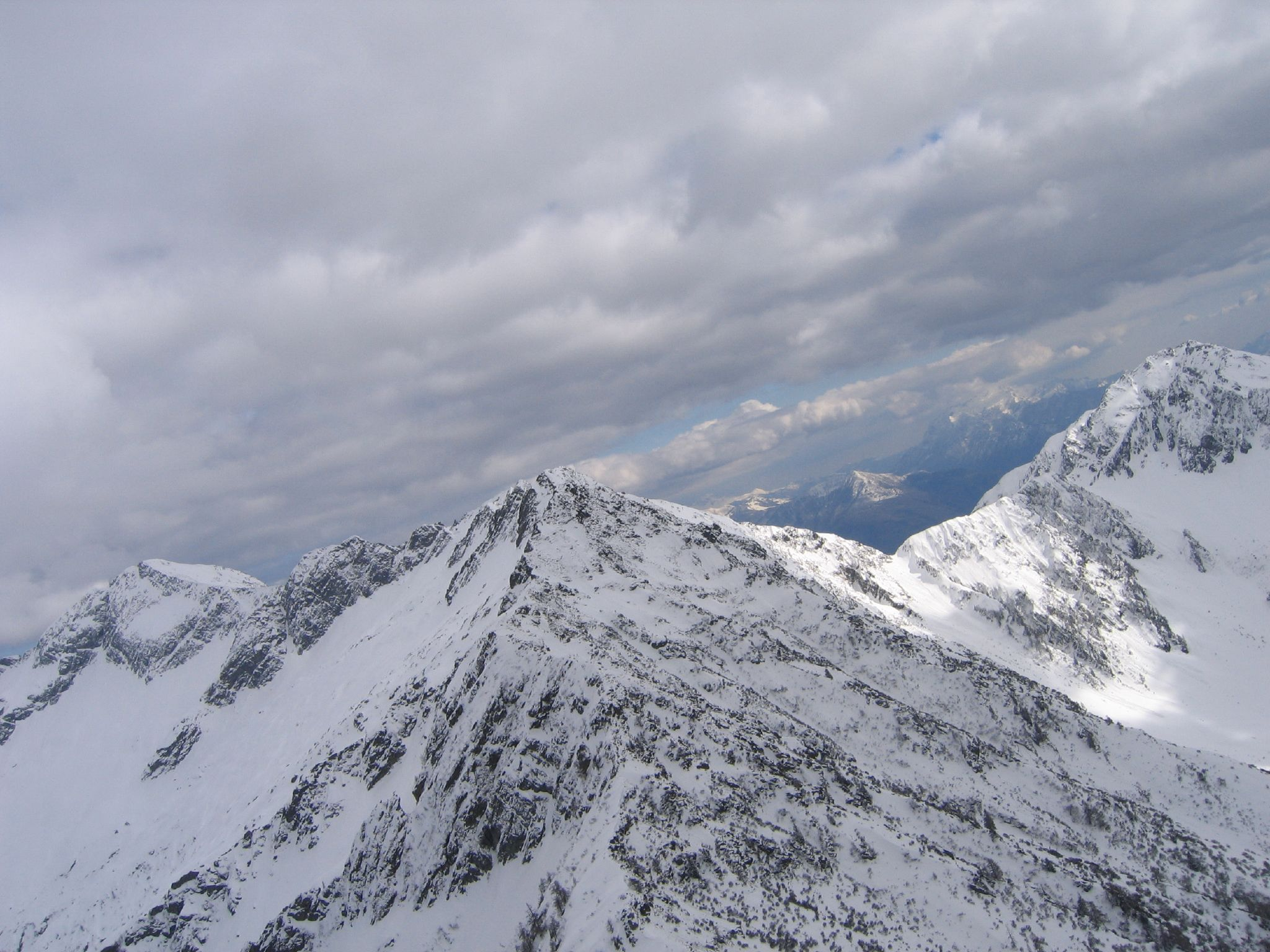 Foto della cima dello Stagn